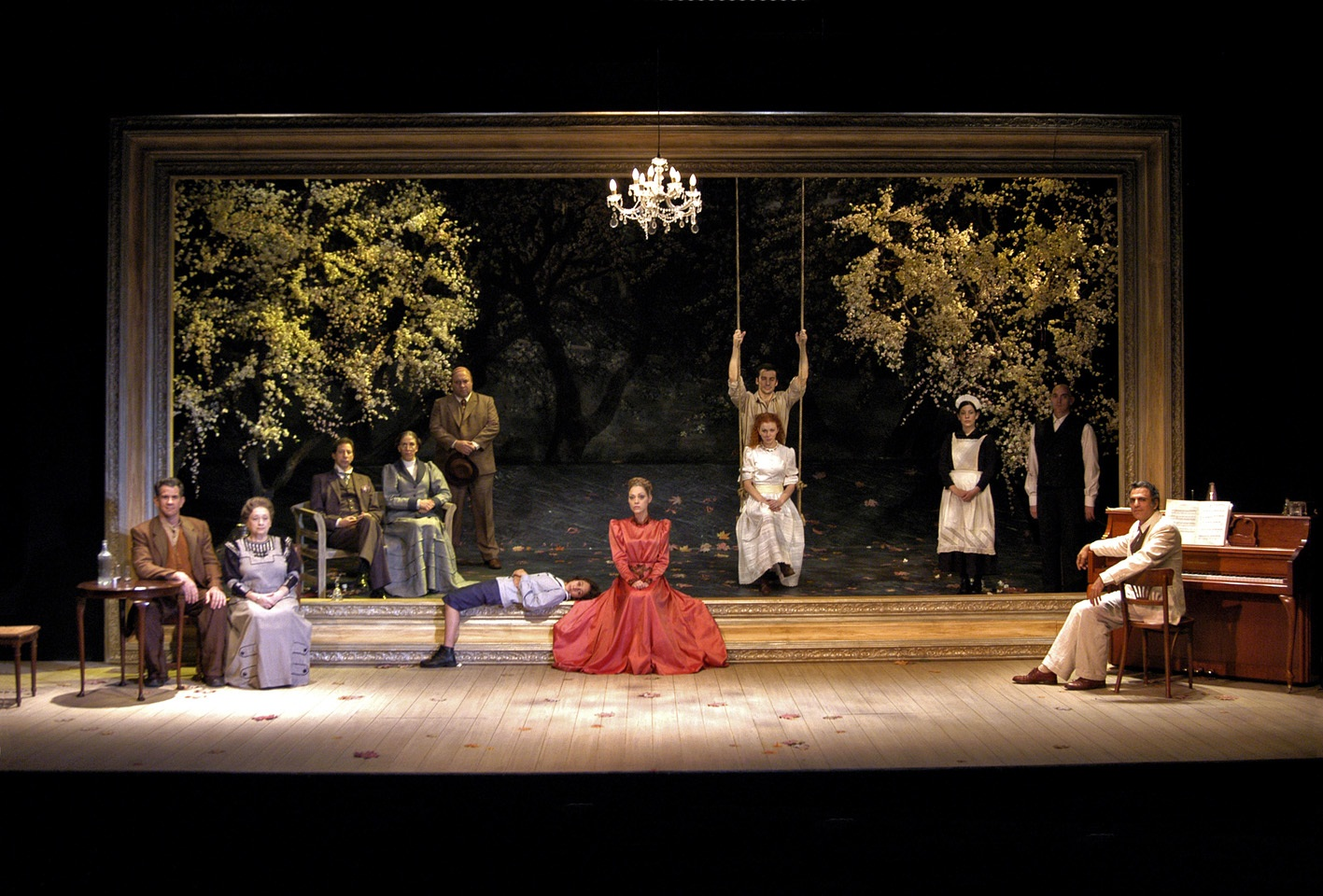 חודש בכפר